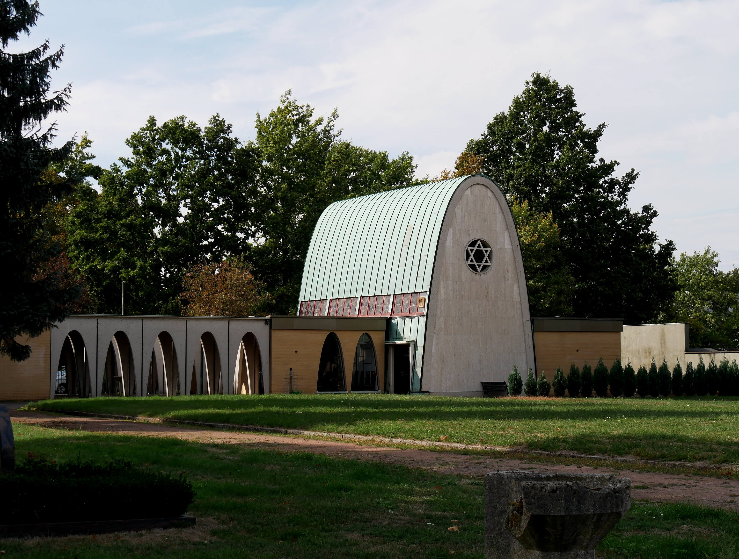 Jüdischer Friedhof in Hannover-Bothfeld, Burgwedeler Straße 90, 1924 eröffnet, Trauerhalle in der Progromnacht 1938 durch Brandstiftung zerstört, neue Trauerhalle von 1960 nach einem Entwurf von Hermann Zvi Guttmann